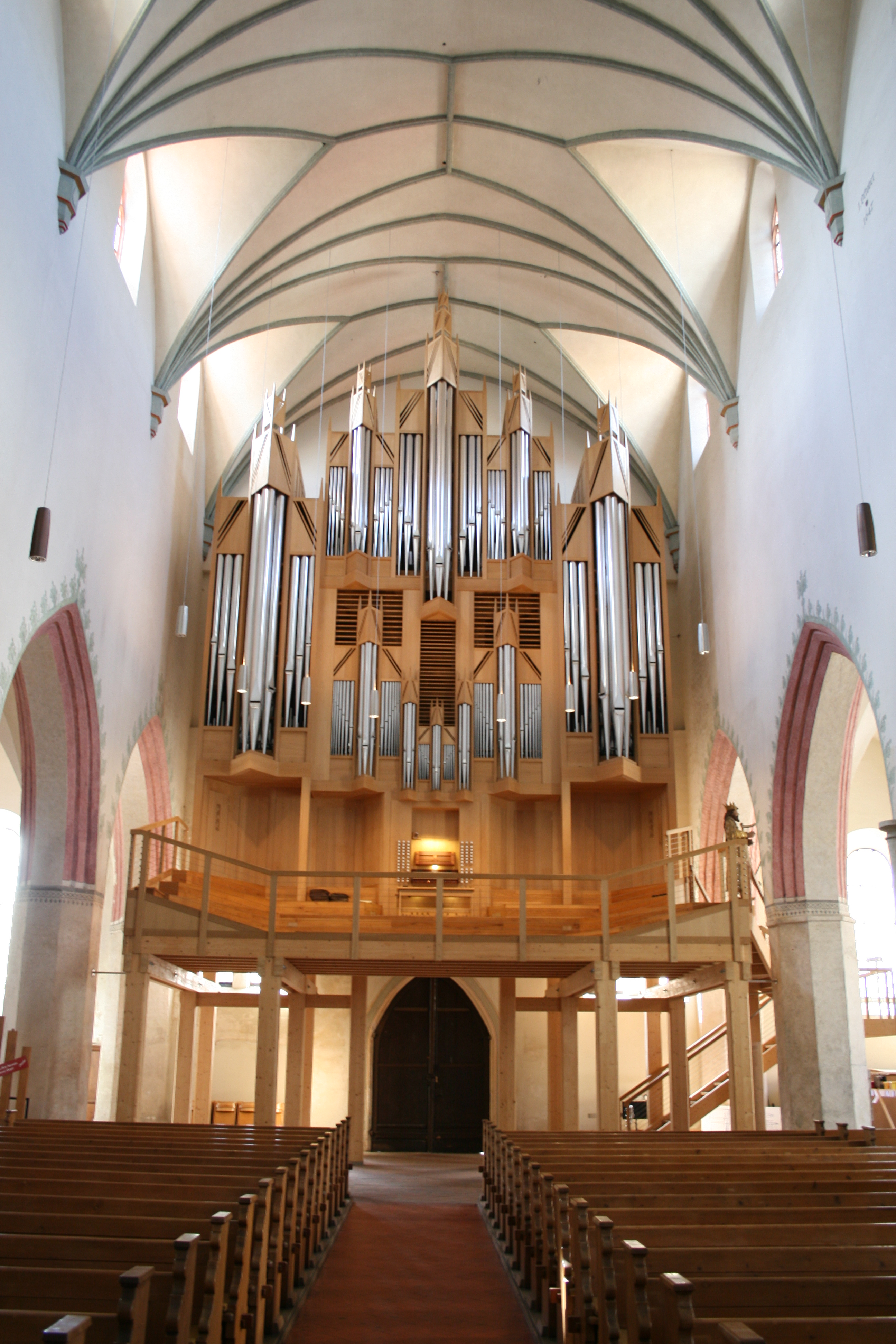 Die Goll-Orgel von 1998, St. Martin in Memmingen